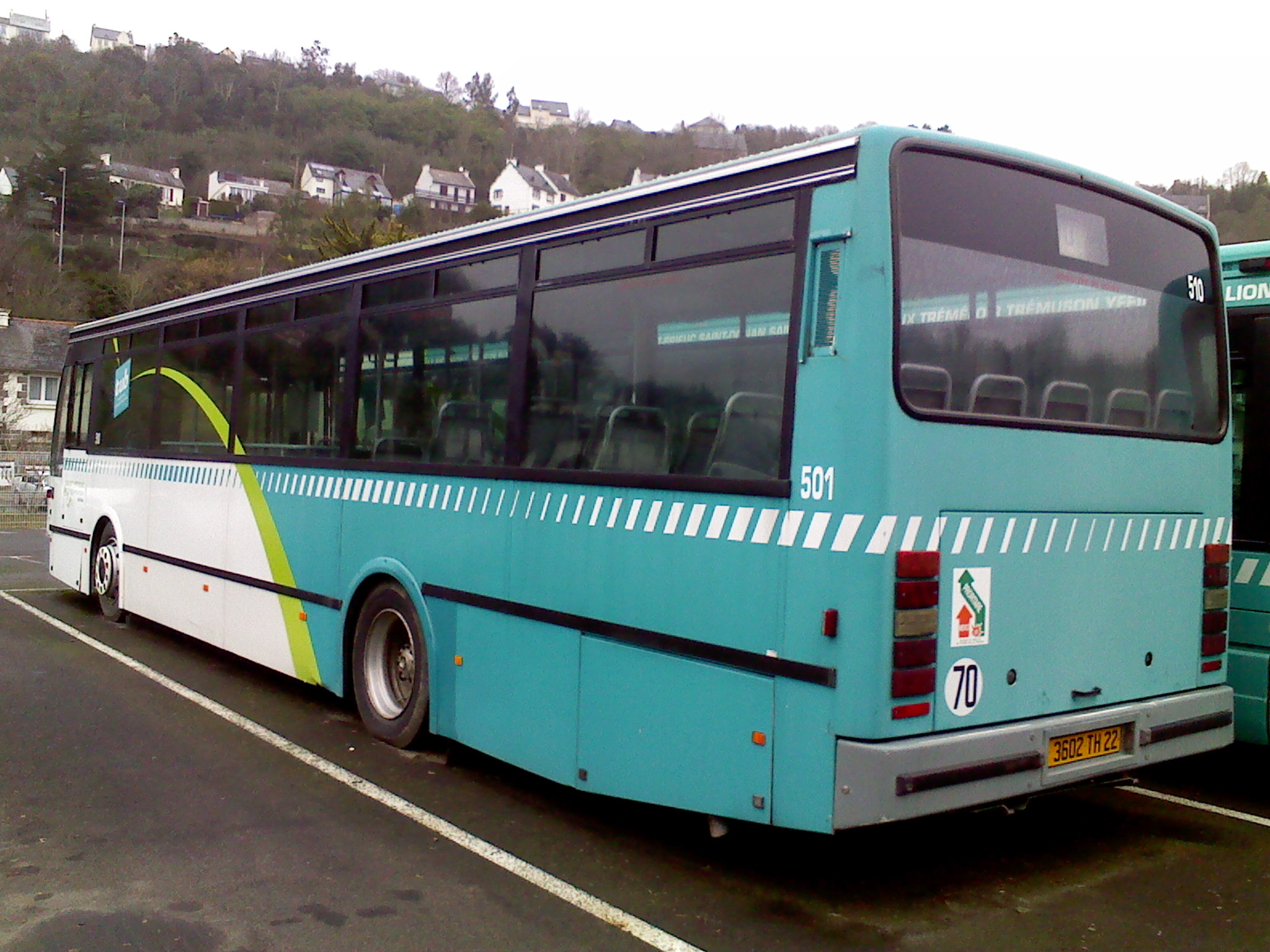 VanHool A-600/1 N°510 TUB